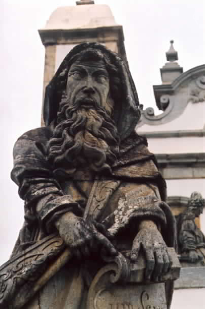 Isaiah, A statue by Aleijadinho (1800-1805)